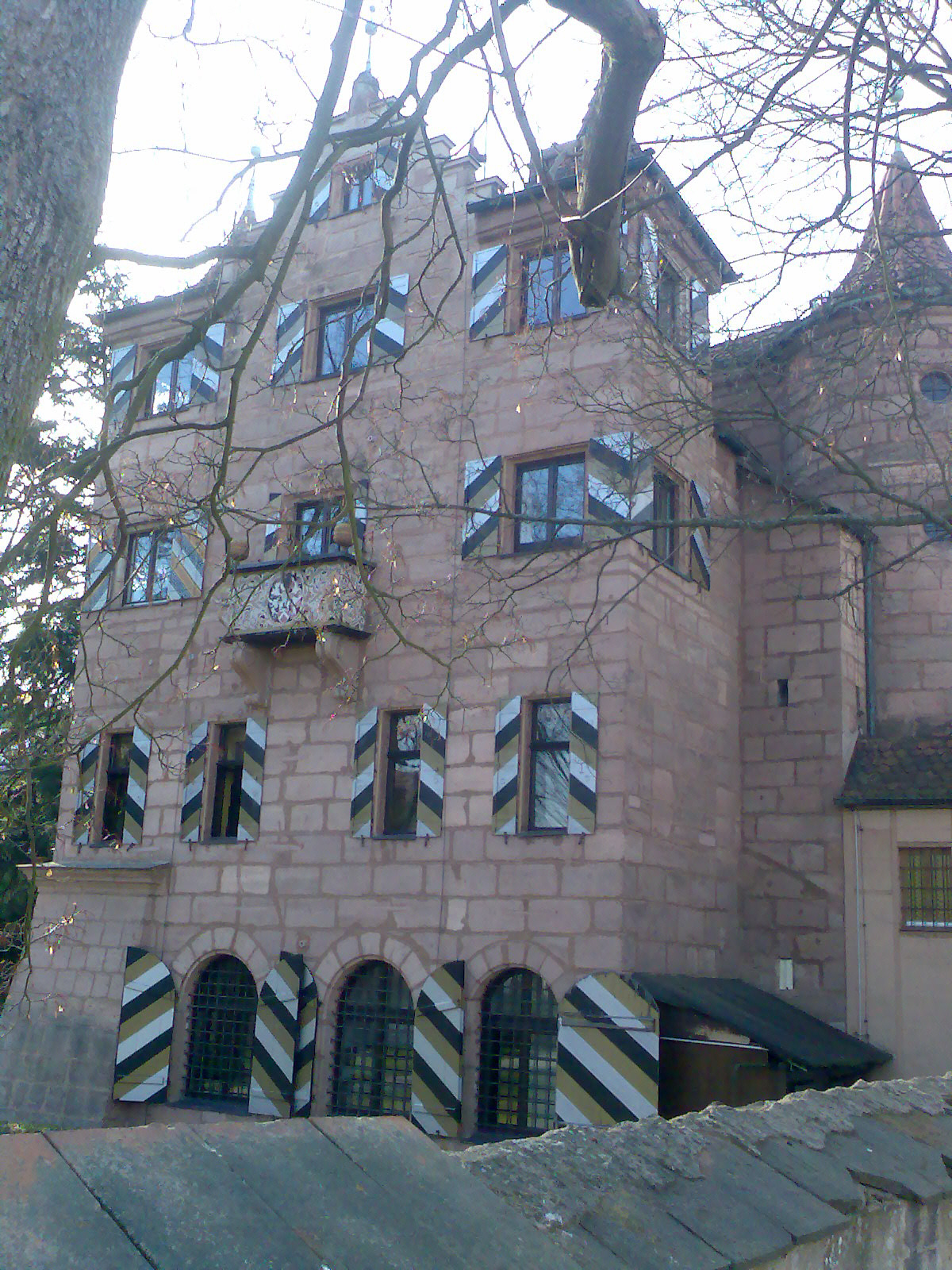 Herrensitz Schoppershof - Südost, Nürnberg, Elbinger Straße 16, 18, 20, 22 b